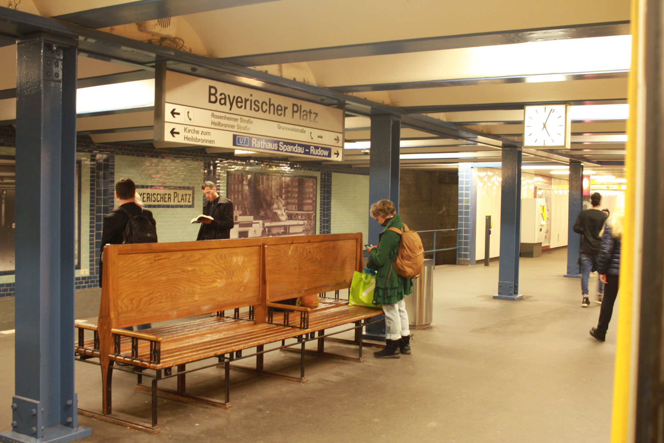 Asema näkyy.